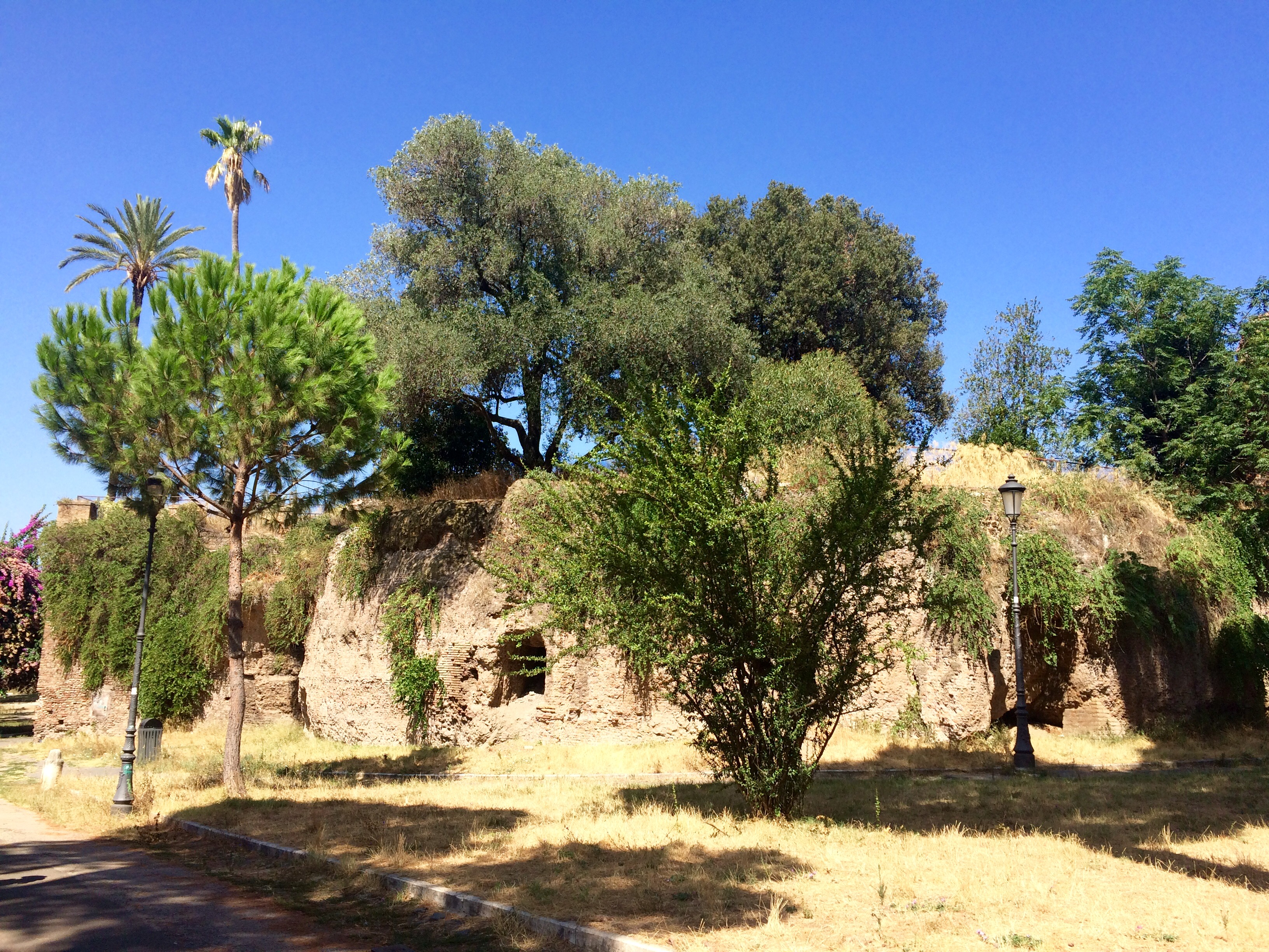 Domus Aurea Roma